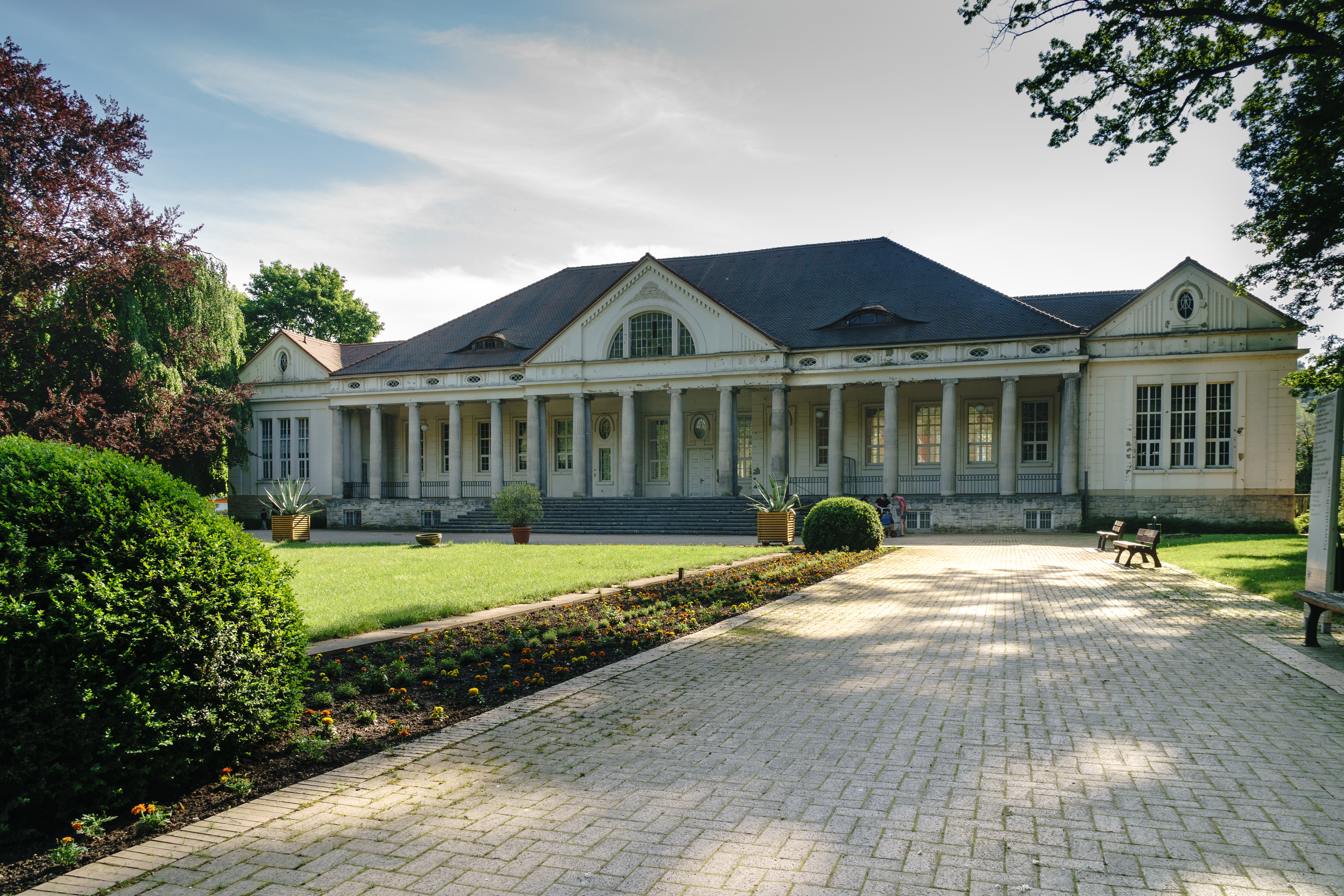 Kurmittelhaus Parkstraße 4 in Naumburg OT Bad Kösen